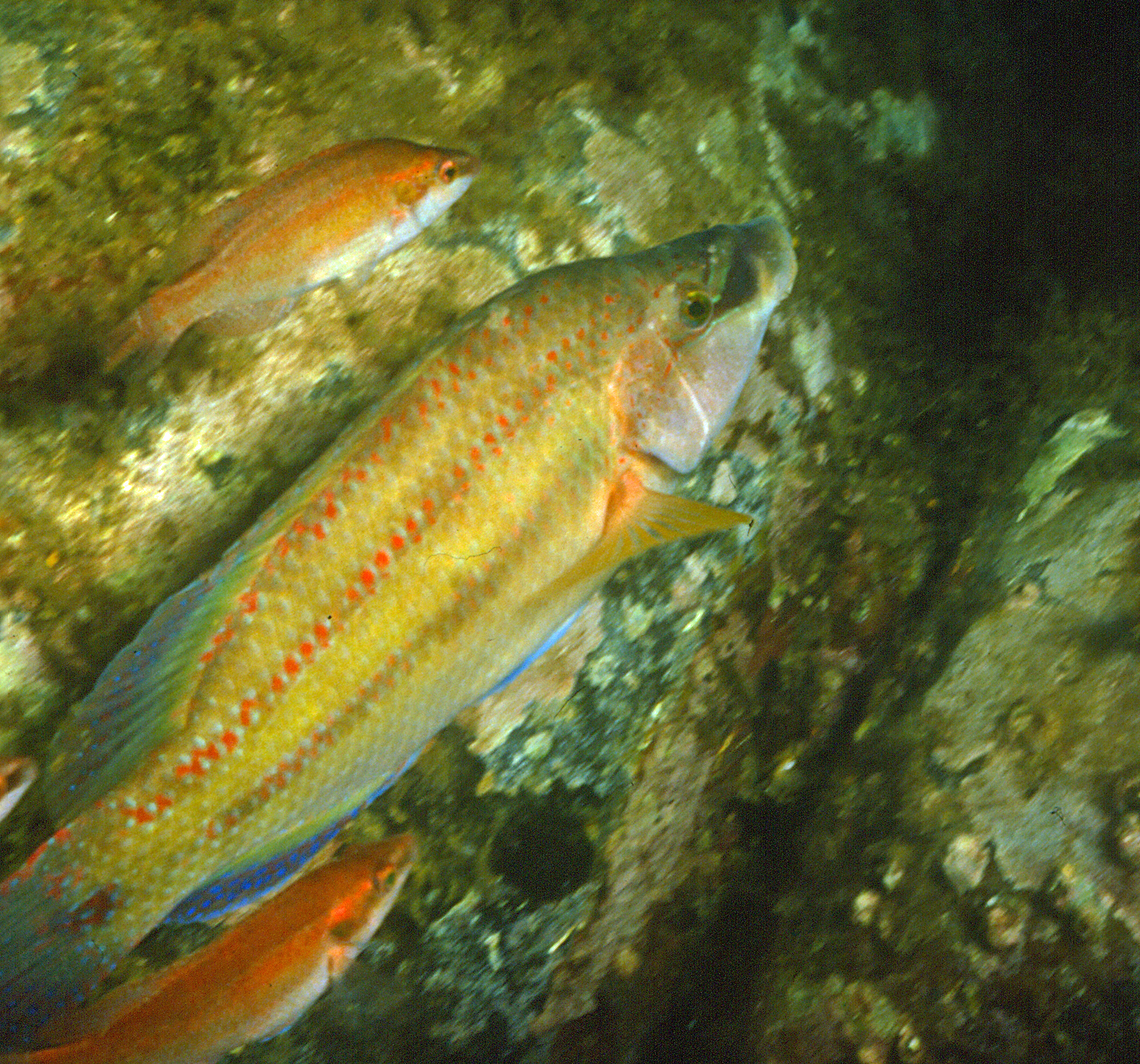 Symphodus tinca (Linnaeus, 1758), mâle et femelles - Banyuls-sur-Mer, Sec de Rédéris : 07/80